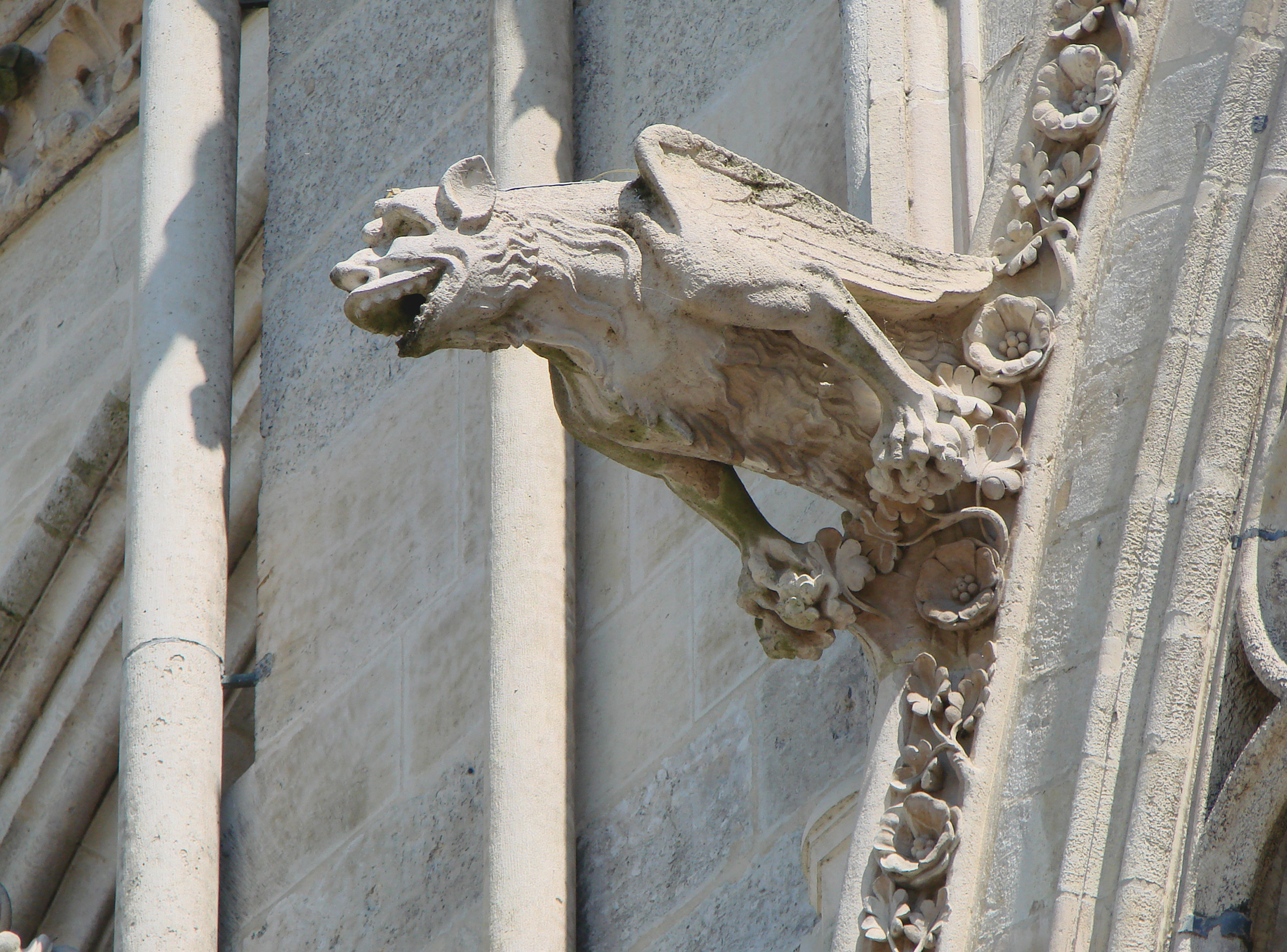 Cathédrale Notre-Dame d'Amiens.Une gargouille de la façade.